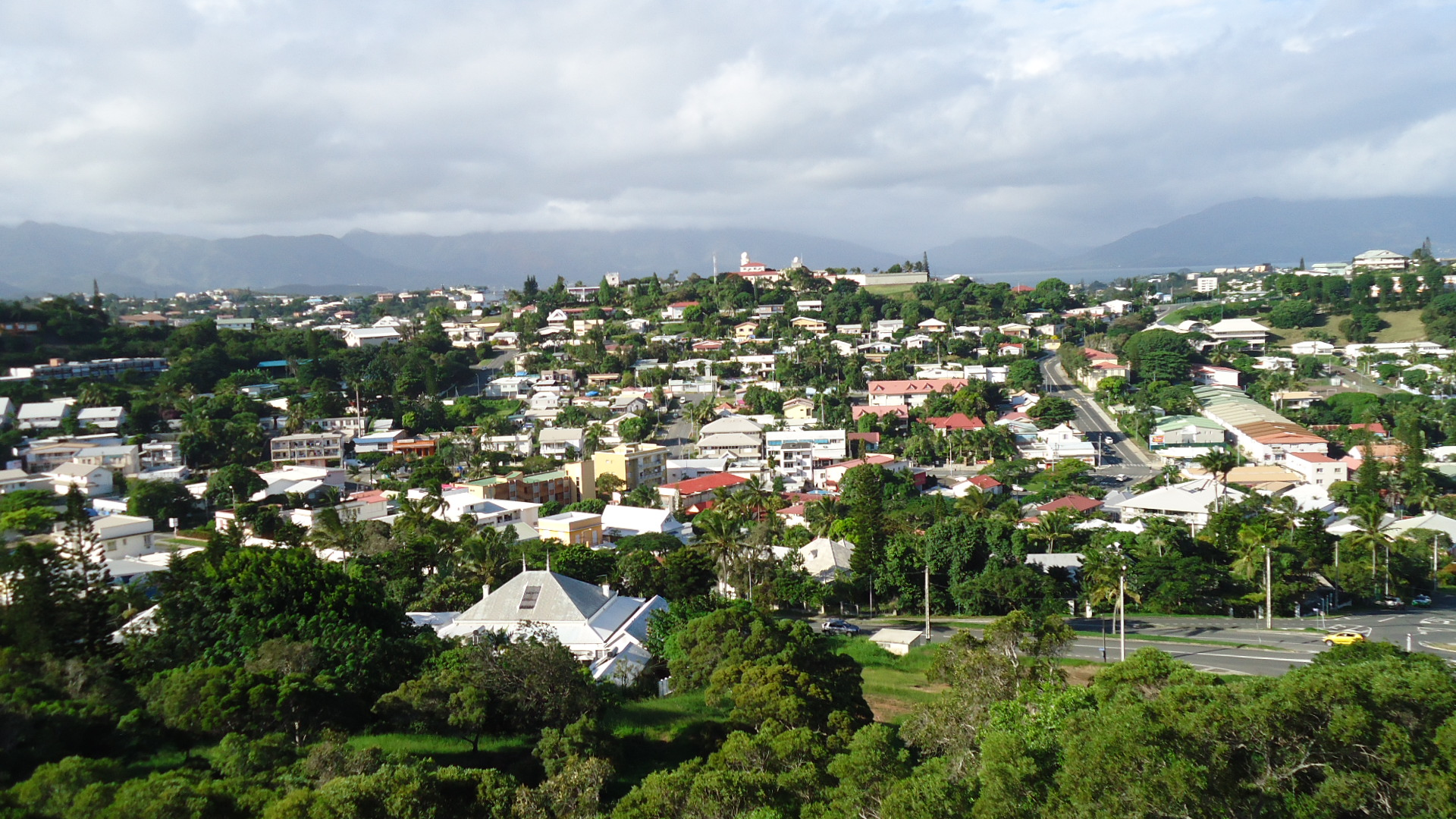 Vue sur le quartier de Faubourg-Blanchot, depuis le Mont Coffyn, à Nouméa